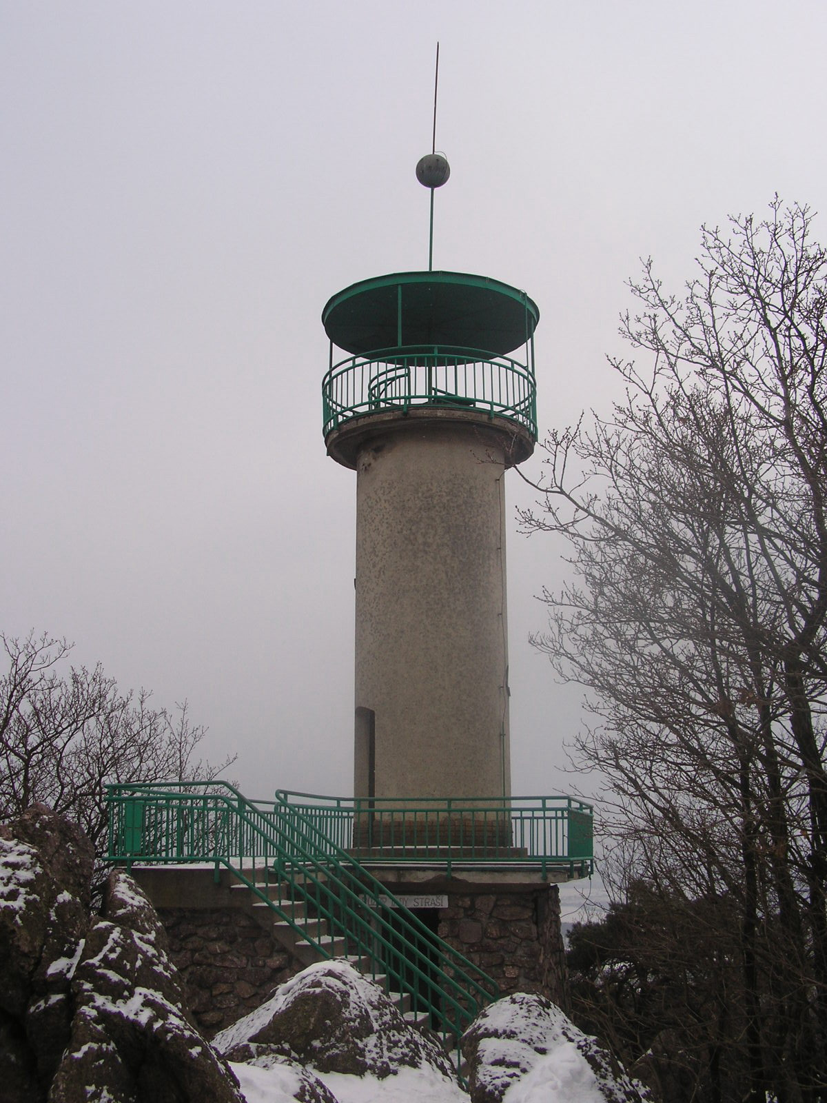 Rozhledna Babí lom na stejnojmenném vrchu nad Lelekovicemi